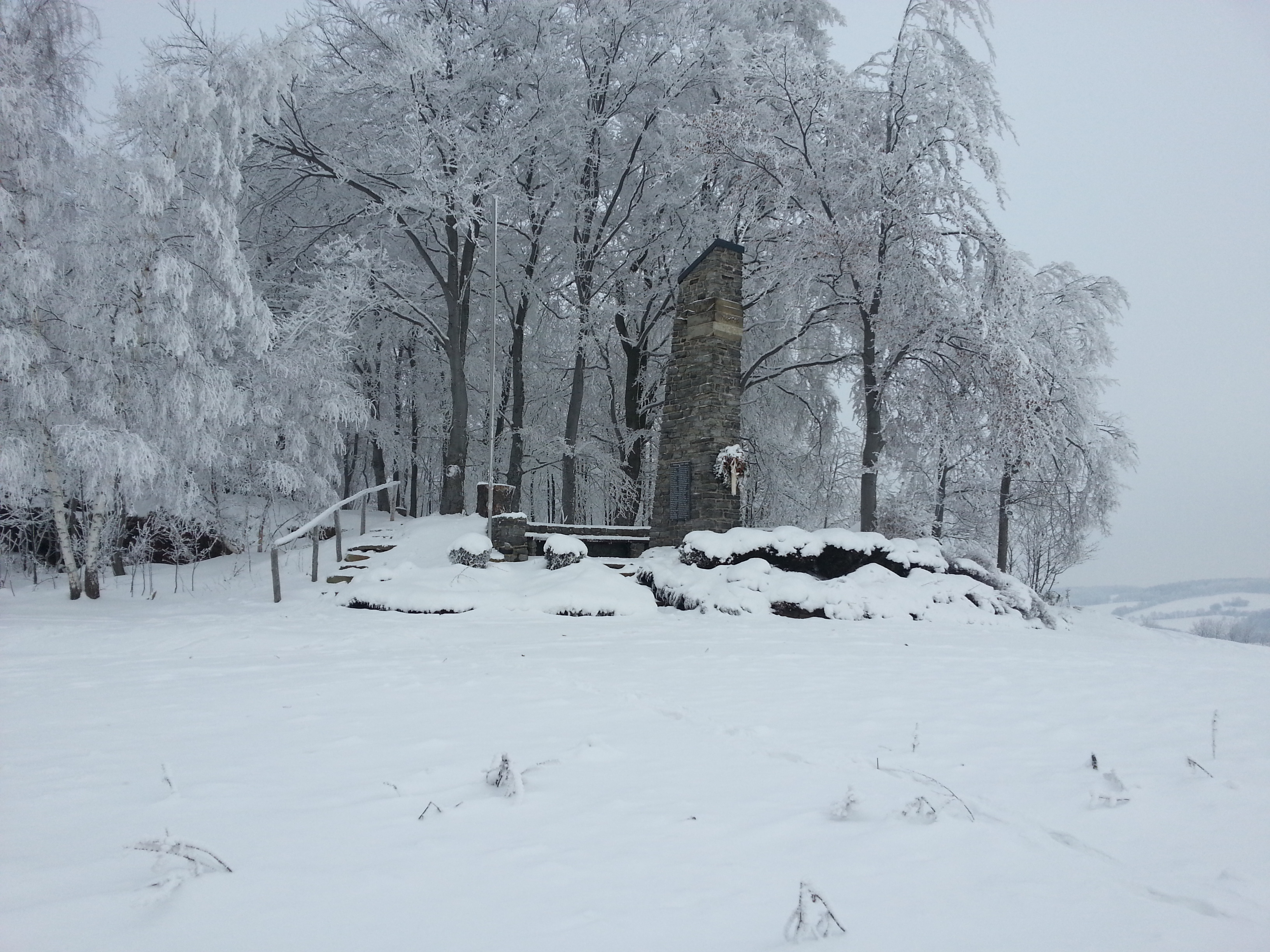 Die Morgensternhöhe im Winter